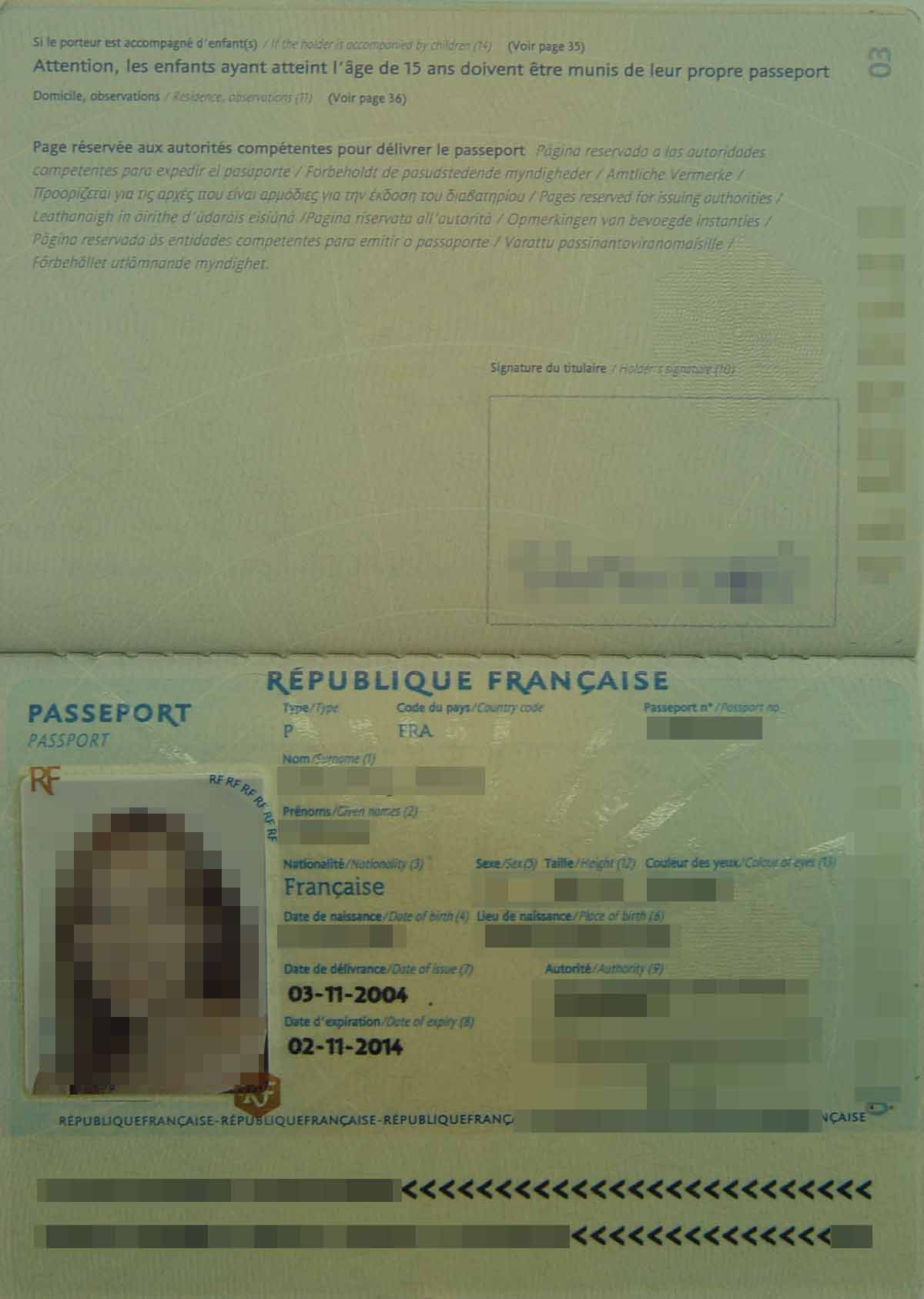 Pages d'identité du passeport français (pages 2 et 3)